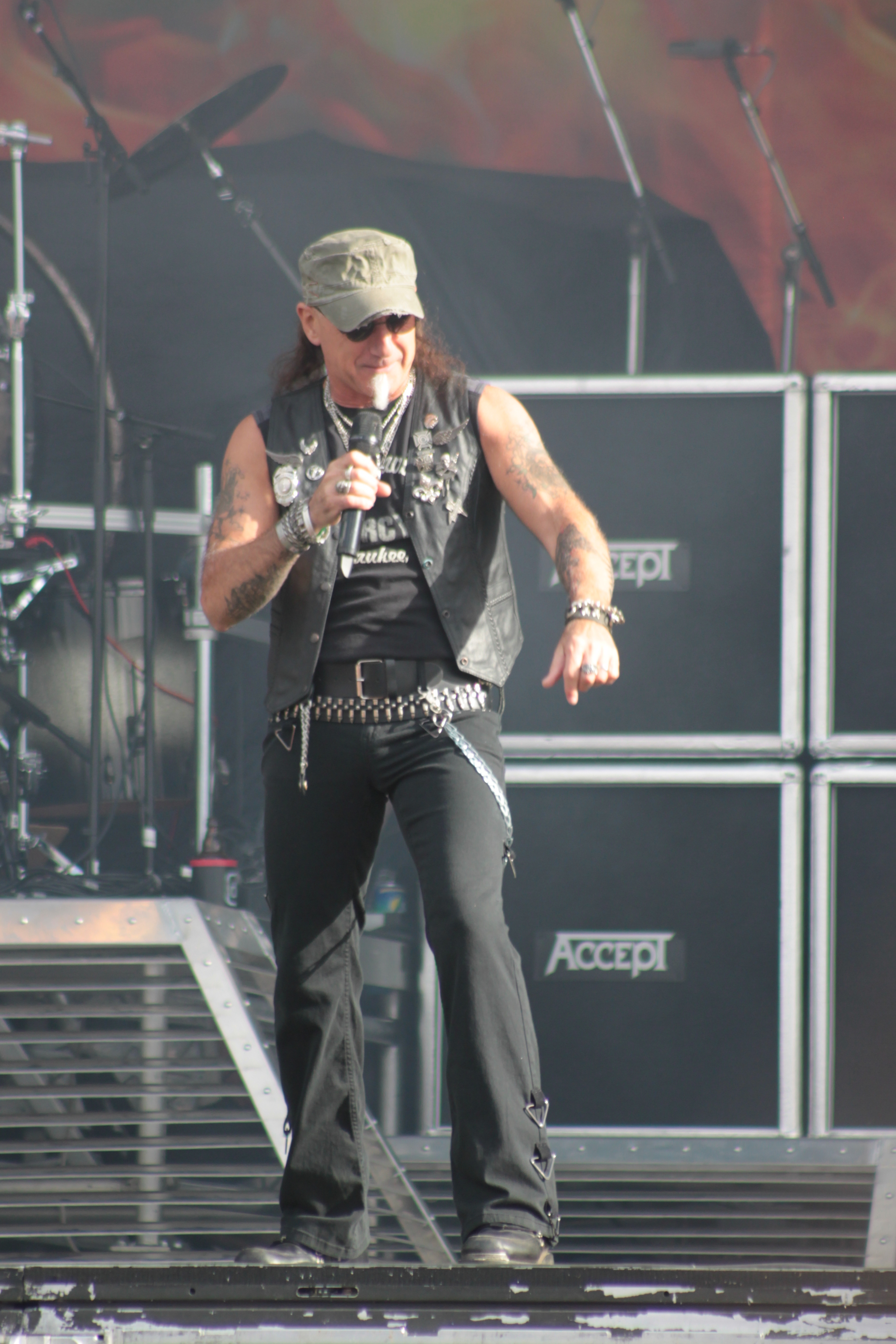 Mark Tornillo, Accept, Helfest 2013, Fr-44-Clisson.